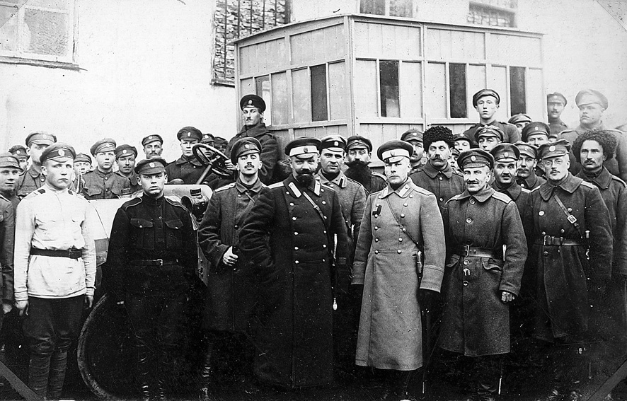 Генерал А. П. Кутепов в штабе пехотной дивизии в Свищеве. Болгария 1922 г. Слева от Кутепова генерал-майор Ф. Э. Бредов, справа генерал-лейтенант В. К. Витковский, в первом ряду крайний справа В. Х. Даватц.